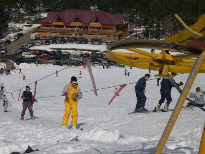 Imagen de la pequeña estación de Valle del Sol, en Burgos. Falta una imagen en la ficha del artículo, y esta encajaría bien. De hecho, la estación no tiene nada mas que lo que se ve.